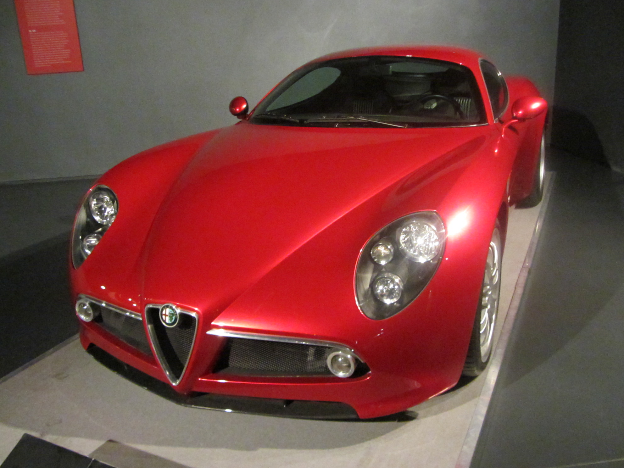 Un'Alfa Romeo 8C Competizione al Museo dell'Automobile di Torino